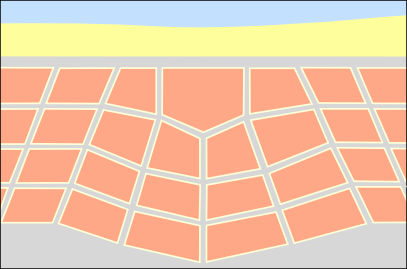 Modèle mixte (damier/radioconcentrique) Urbanisme